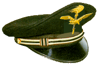 Berretto rigido da cerimonia per sottufficiale dell'Esercito con fregio dell'aviazione